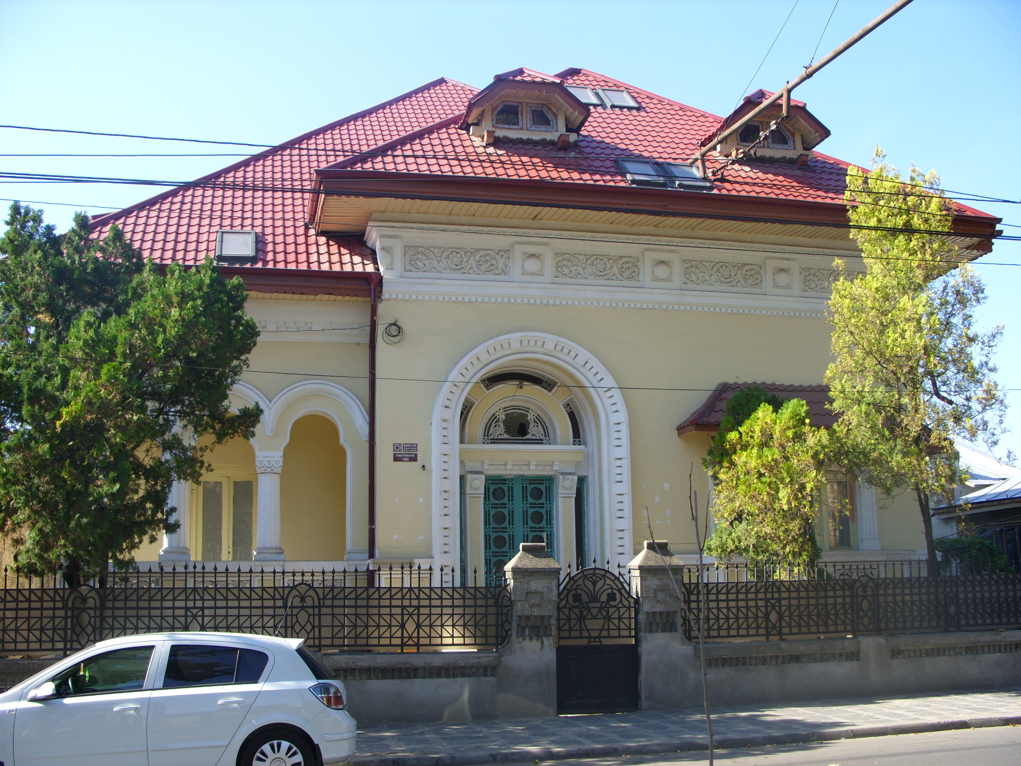 Casa Fanciotti